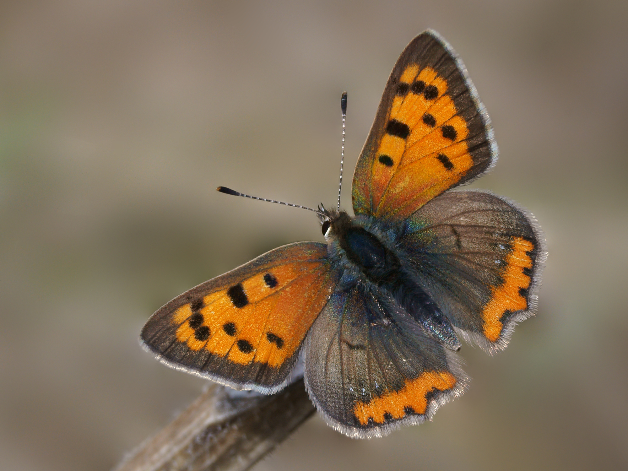 small copper kleiner Feuerfalter